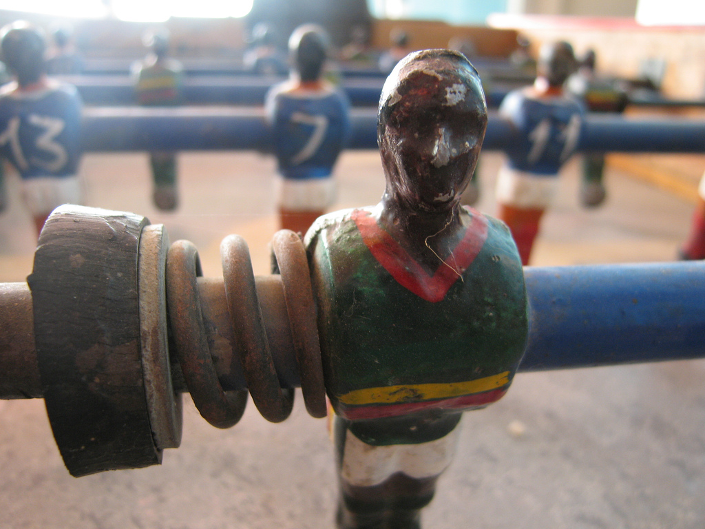 Babyfoot sénégalais